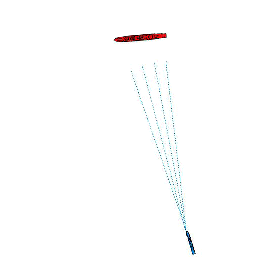 Schematische Darstellung eines Torpdofächers (Angriff auf ein Schiff mit mehreren Torpedos). Die Größenverhältnisse und Entfernungen sind nicht maßstabsgetreu. Erstellt aus einem anderen Schema auf Wikimedia Commons mit Einverständnis des Autors.